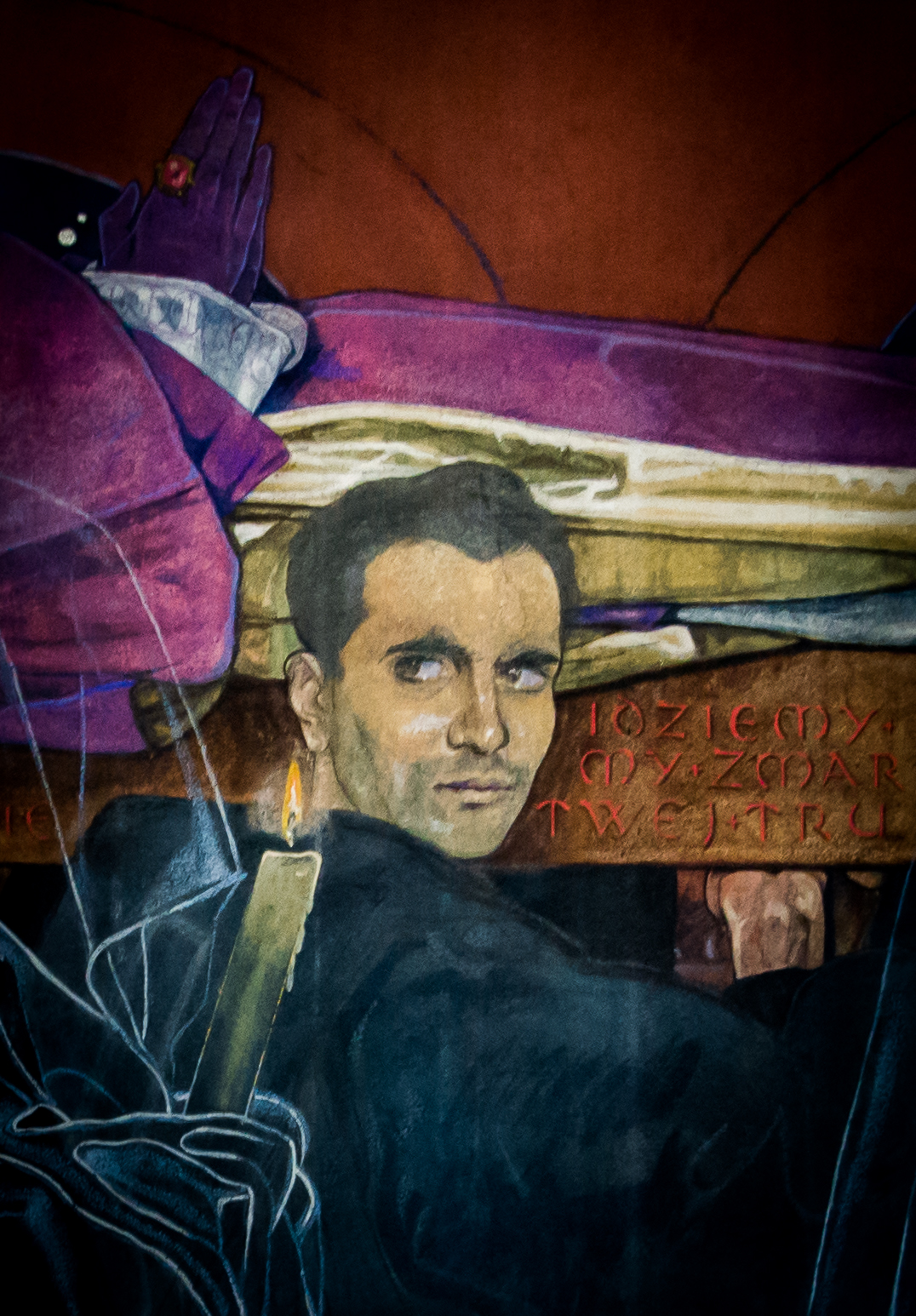 Selbstportrait (Detail) im Wandbild "Begräbnis des Hl. Odilo", Armenische Kathedrale, Lwiw